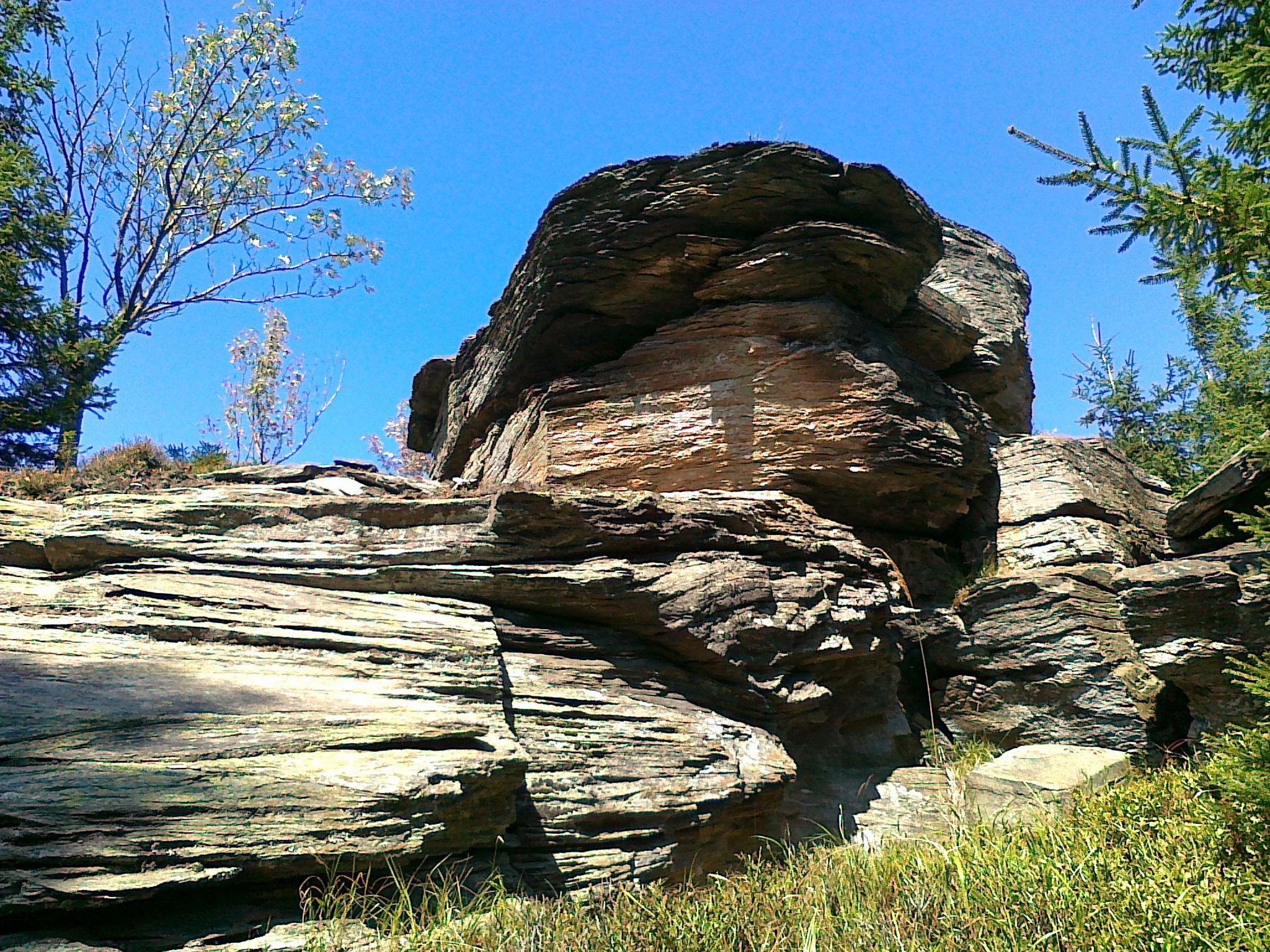 Jedno ze skalisk szczytowych góry Karliny kameny - 1078 m n.p.m.